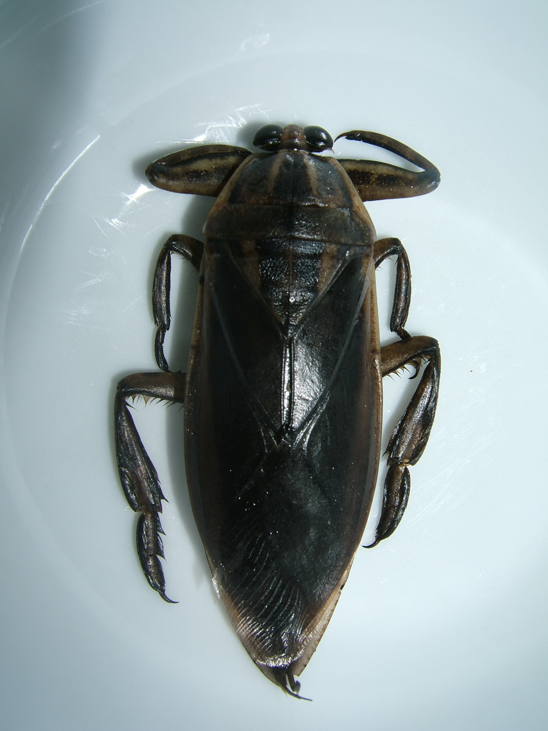 Một con cà cuống nằm trong lòng một chiếc bát ăn cơm.